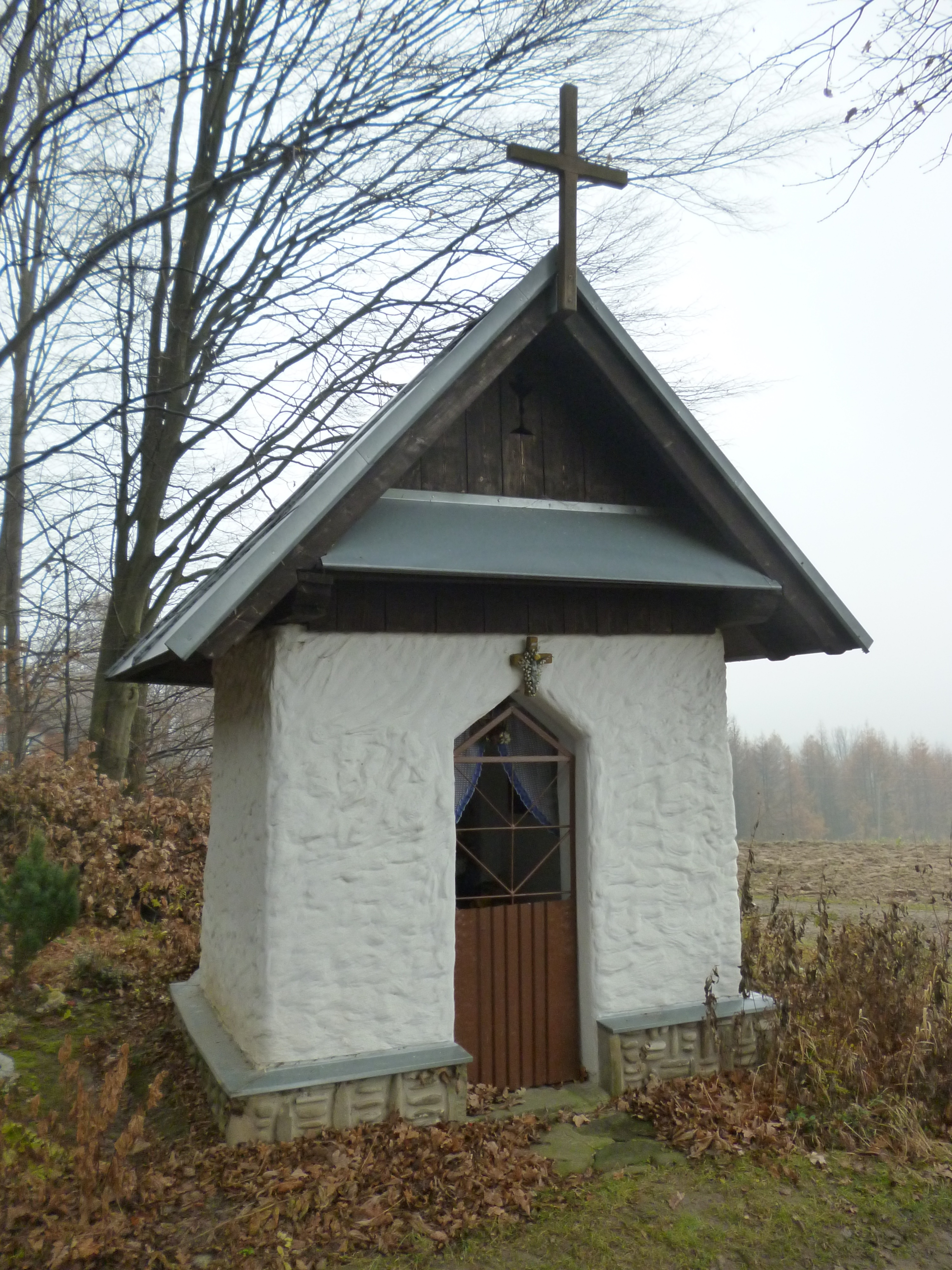 Stróże, kapliczka zbudowana w XVIII. Stoi pod lasem niedaleko Dworku Zarębów (obecnie własność Kasztelewiczów)